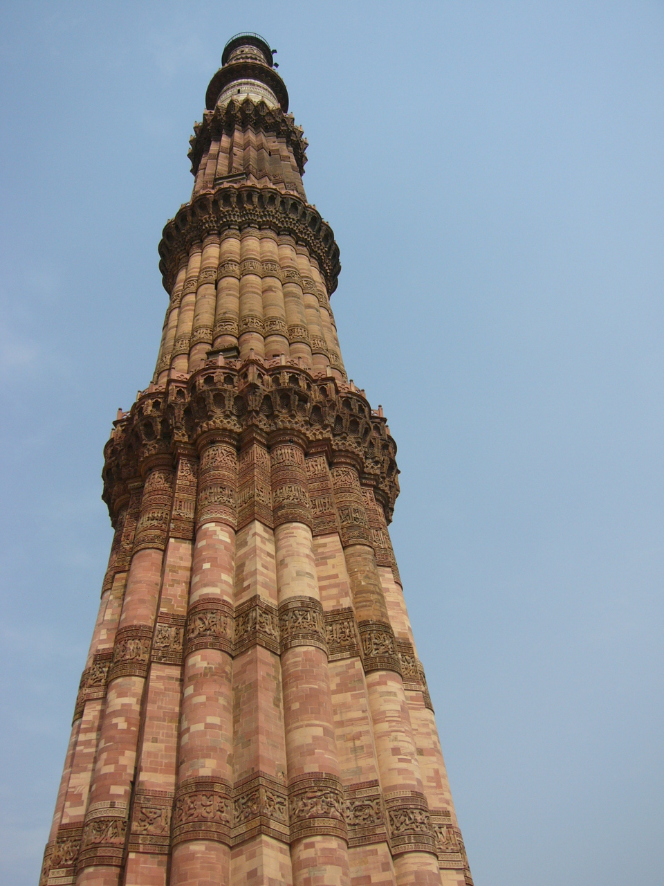 Kutub Minar Delhi India